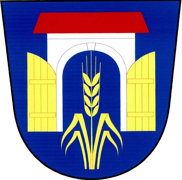 Znak obce Vrátno